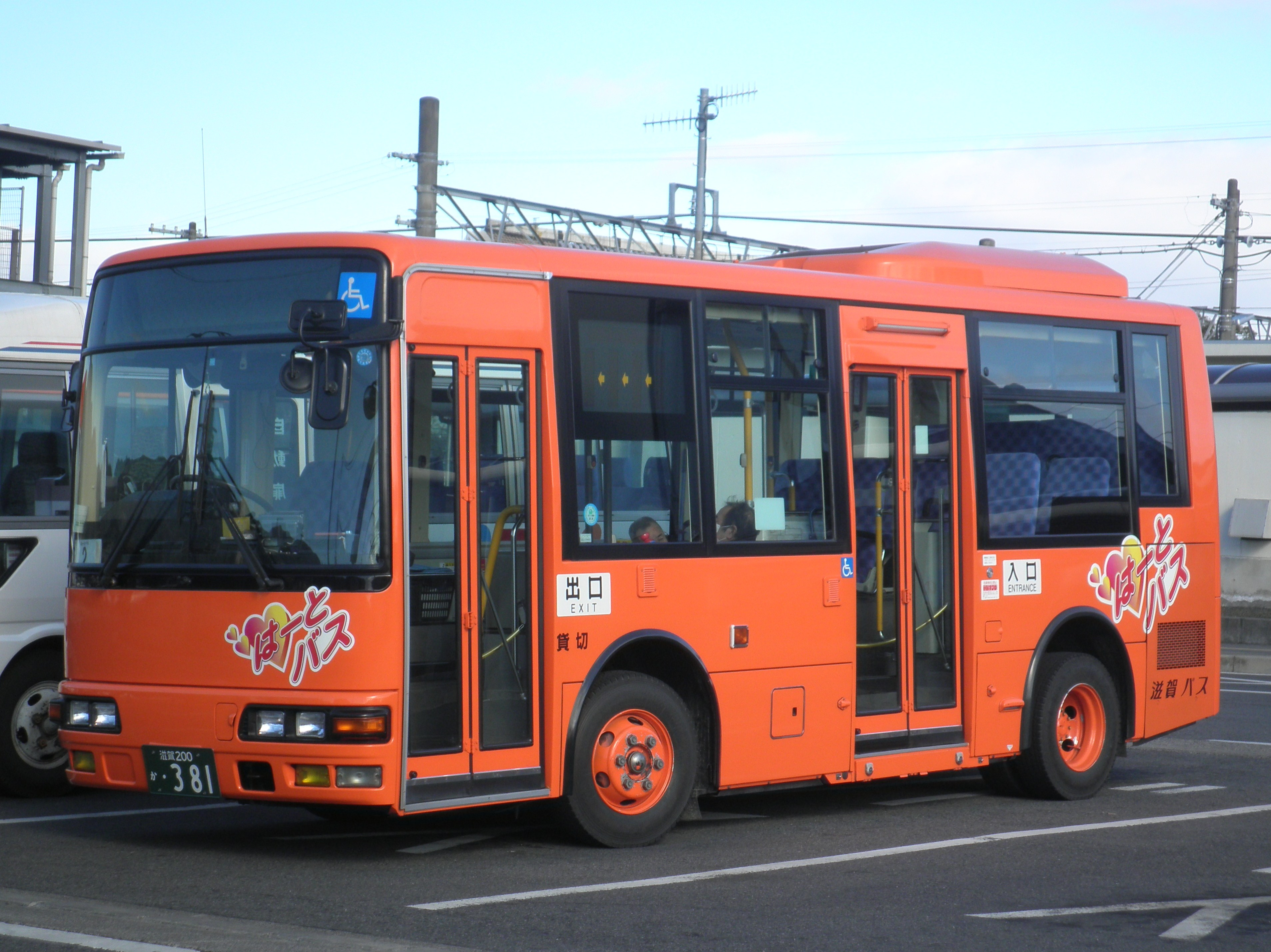 滋賀県甲賀市のコミュニティバス「はーとバス」 貴生川駅にて撮影